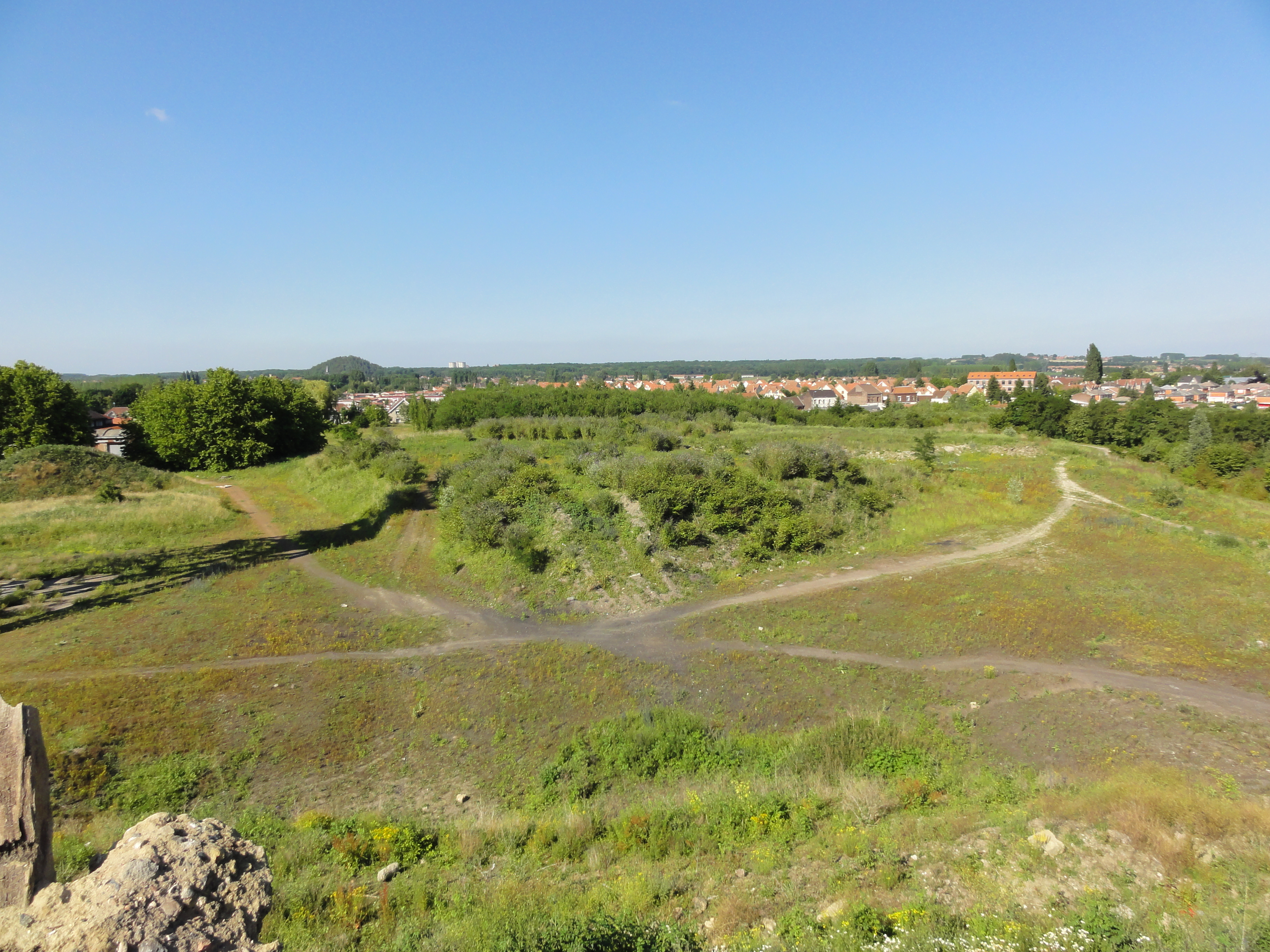 Terril n° 109 dit 8 de Dourges Nord, fosse n° 8 - 8 bis de la Compagnie des mines de Dourges dans le bassin minier du Nord-Pas-de-Calais, Évin-Malmaison, Pas-de-Calais, Nord-Pas-de-Calais, France.